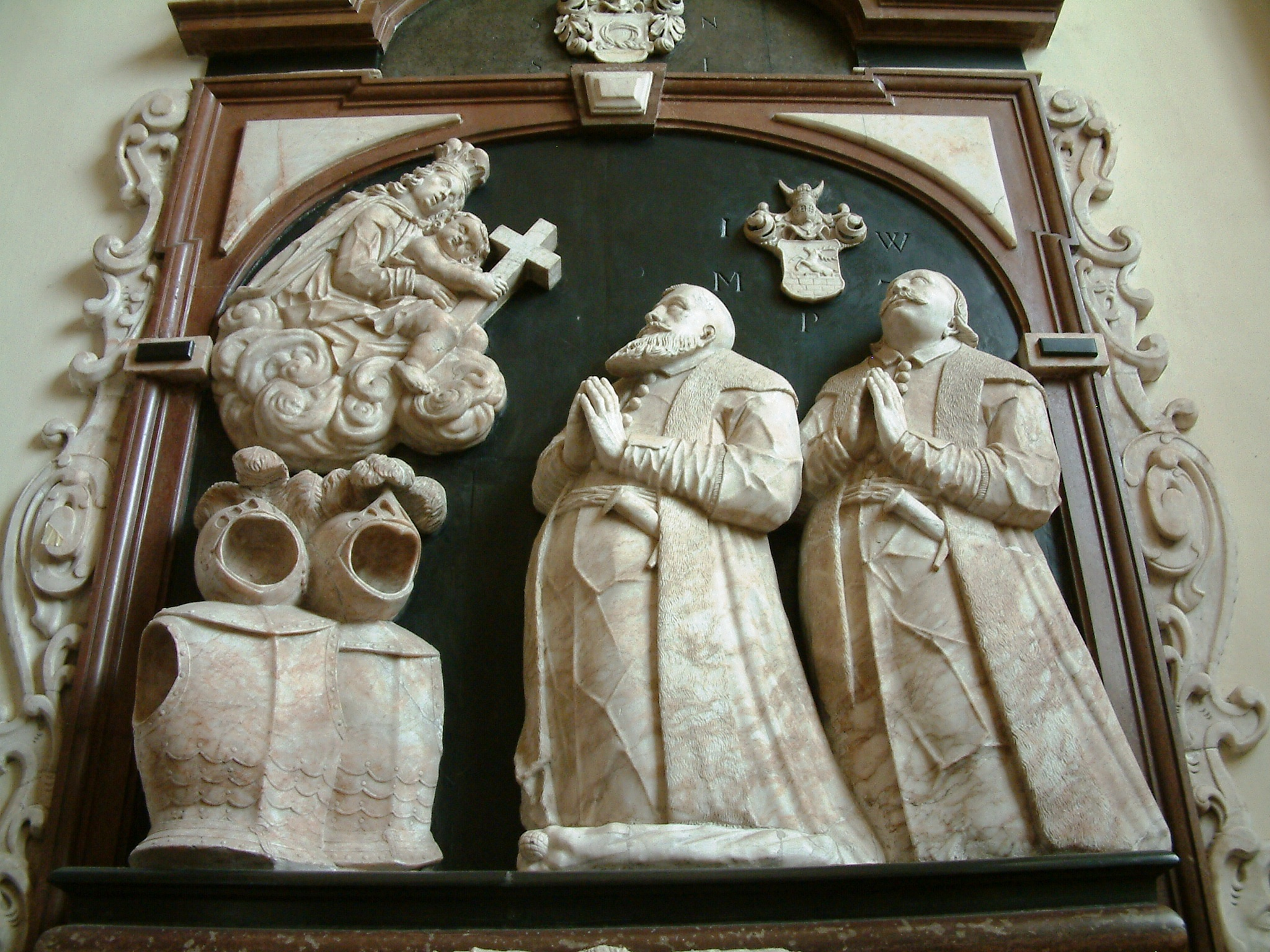 Epitaph of Zygmunt Raczyński and Jan Wąglikowaski in Poznań Archcatherdral Basilica, detail